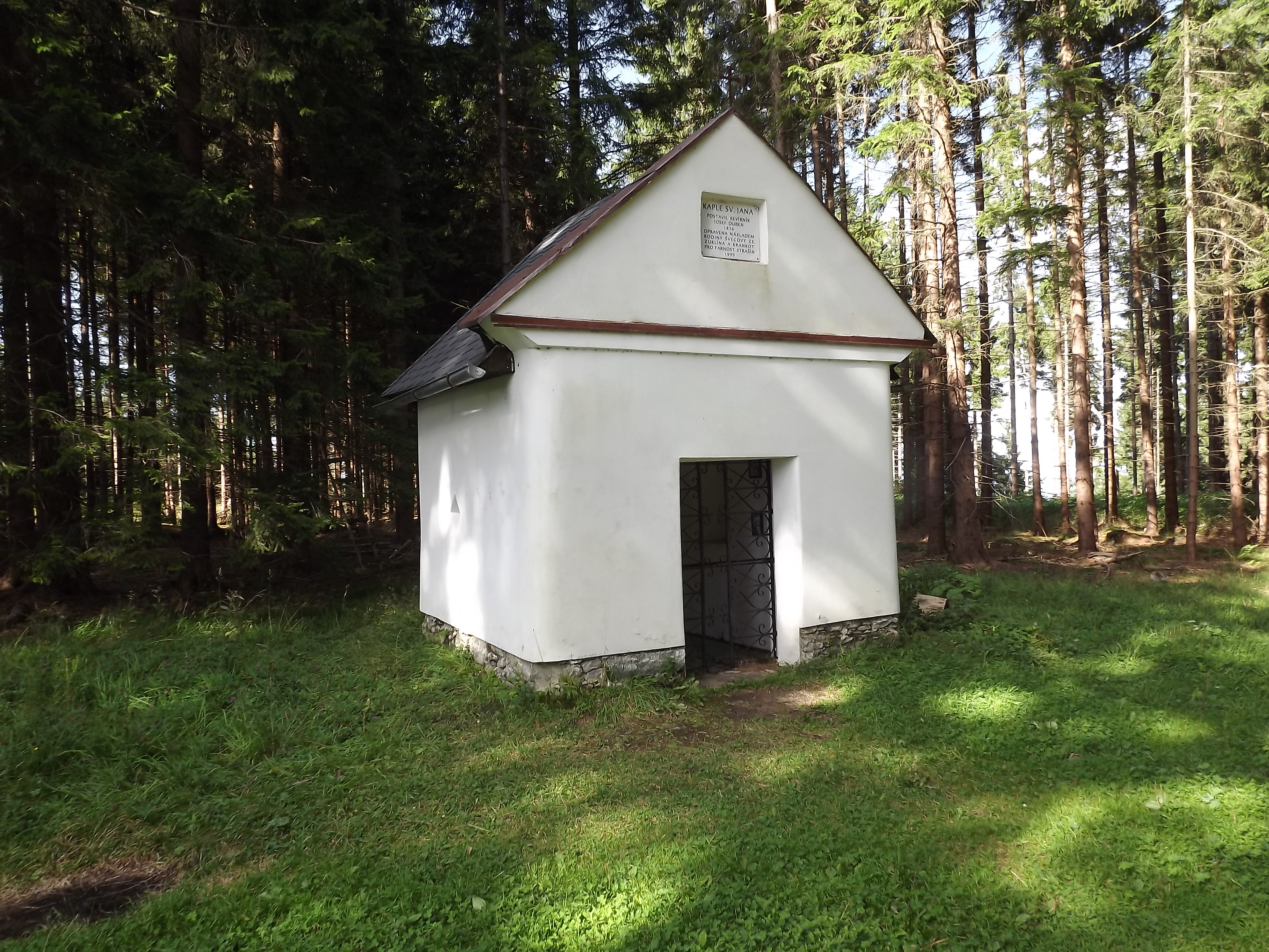 Kaple na vrchu Svatý Jan